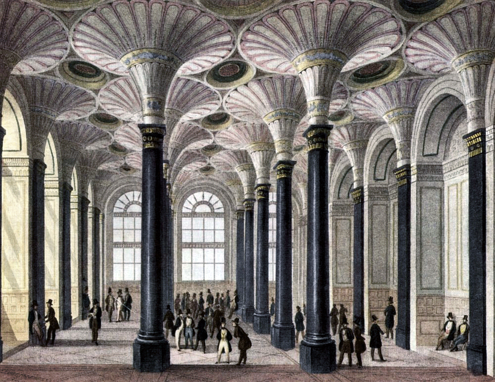 Nach einer Zeichnung von Jakob Fürchtegott Dielmann